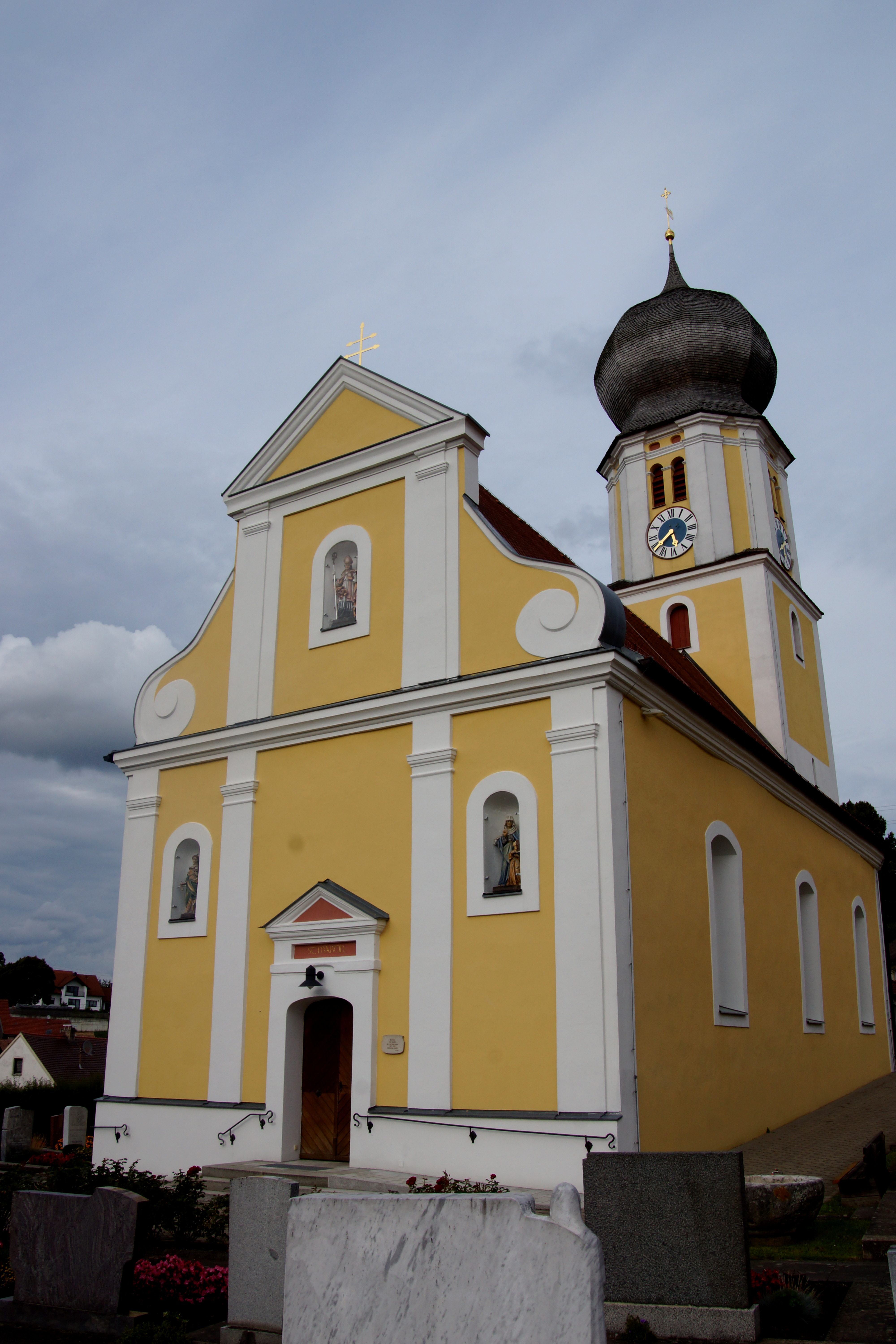 Die katholische Pfarrkirche St. Martin im Oberpfälzer Ort Lengenfeld